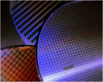 condensateurs fins, IPDiA, condensateurs haute temperature